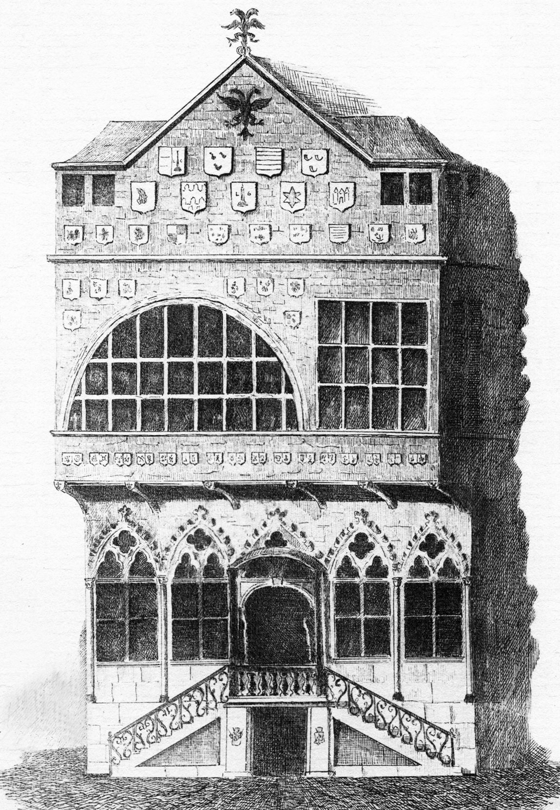 La Violette dat fréiert Stadhaus vu Léck no enger Zeechnung aus engem Manuscript vum L. Abry vu 1684.